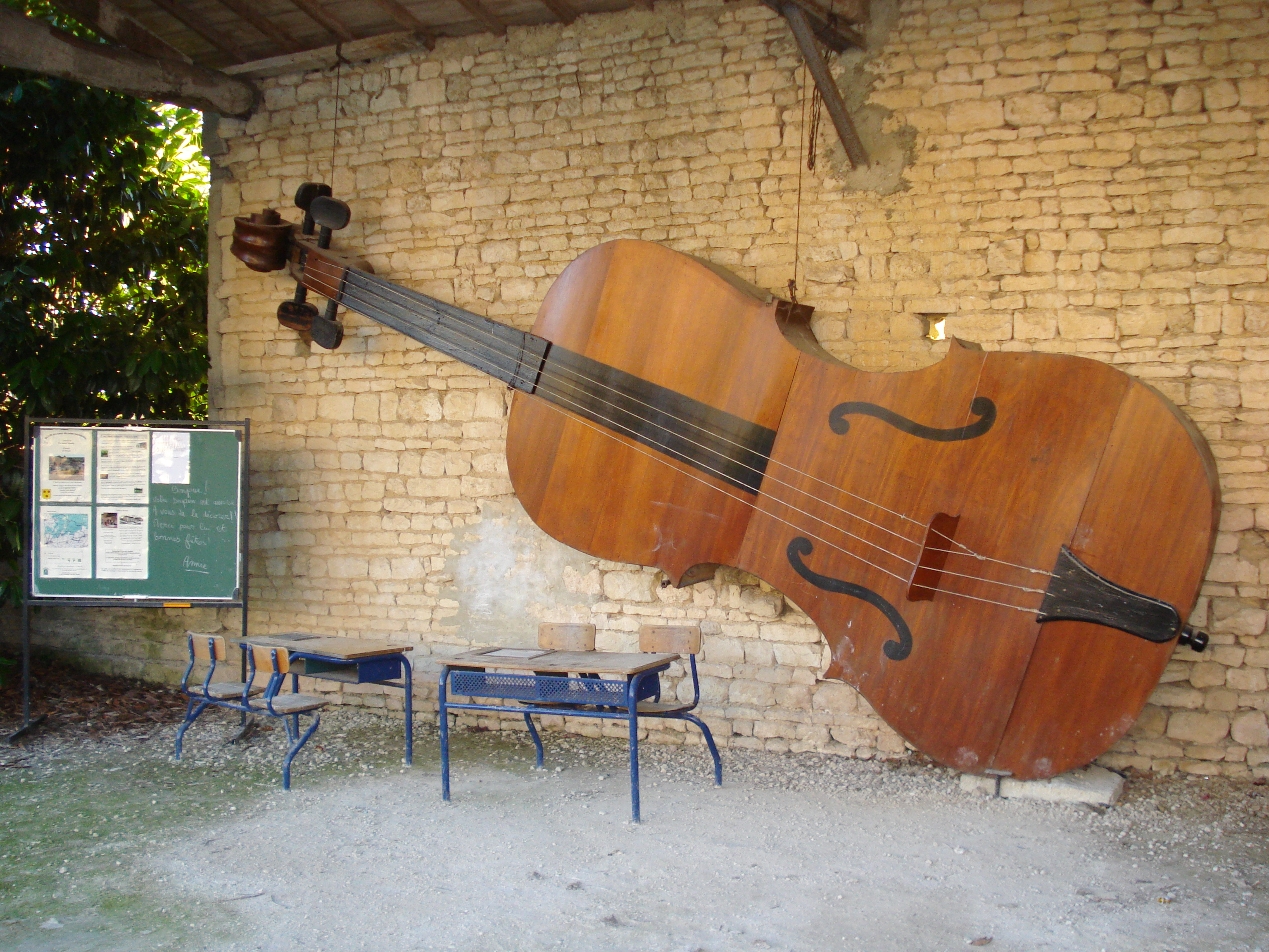 Le violon